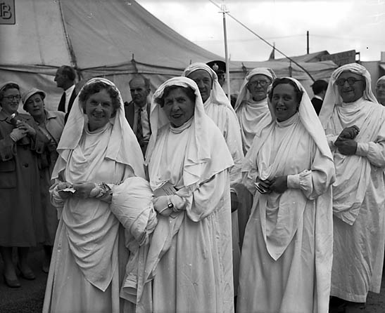 Teitl Cymraeg/Welsh title: Eisteddfod Genedlaethol Cymru, Glynebwy, 1958 : Telynores Eryri a Dilys Wynne Williams yn eu gwisgoedd Gorsedd Ffotograffydd/Photographer: Geoff Charles (1909-2002) Dyddiad/Date: August 4, 1958. Cyfrwng/Medium: Negydd ffilm / Film negative Cyfeiriad/Reference: (gch16637) Rhif cofnod / Record no.: 3370789 Rhagor o wybodaeth am gasgliad Geoff Charles yn Llyfrgell Genedlaethol Cymru More information about the Geoff Charles Collection at the National Library of Wales